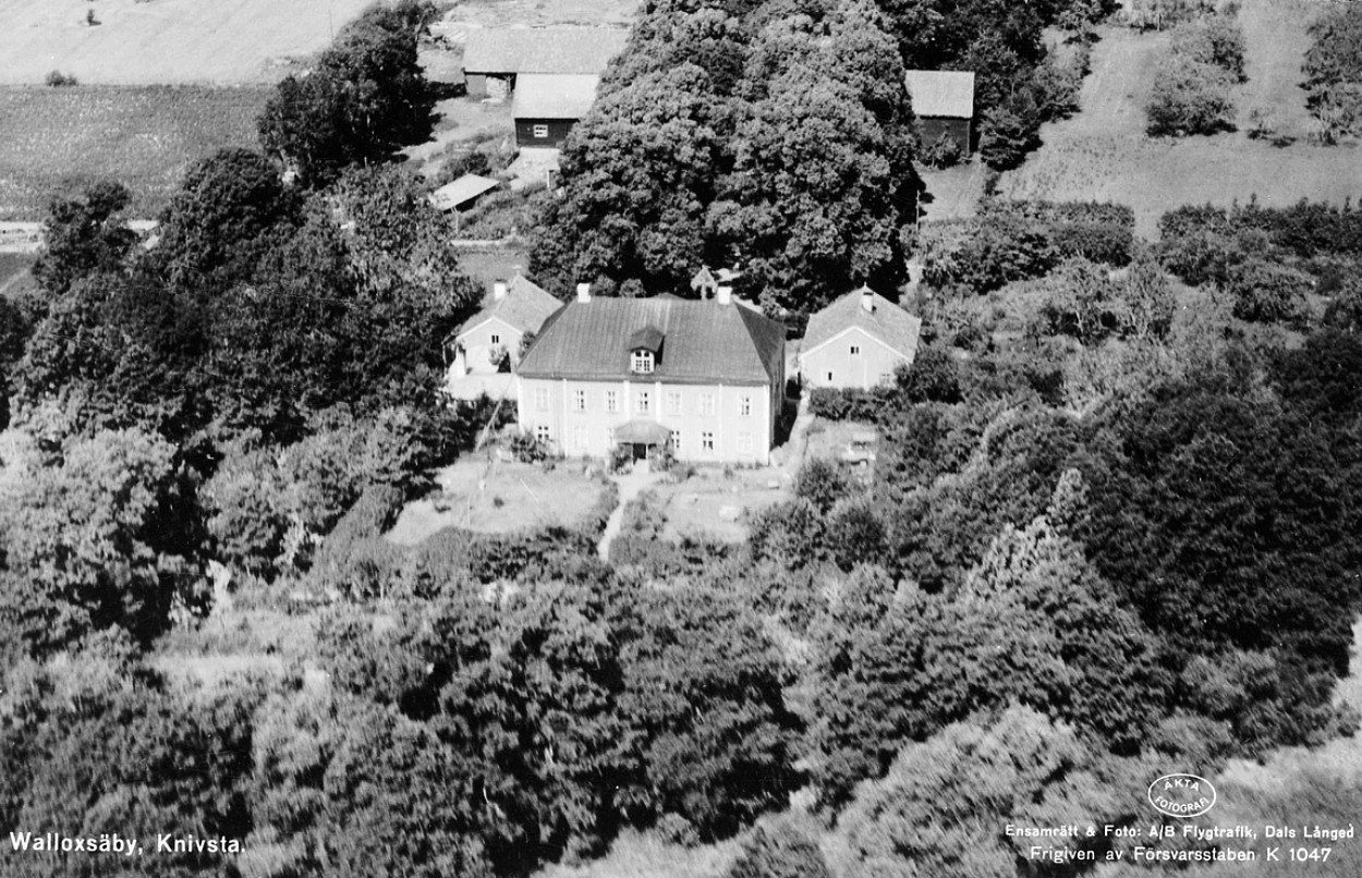 Vallox-Säby från luften